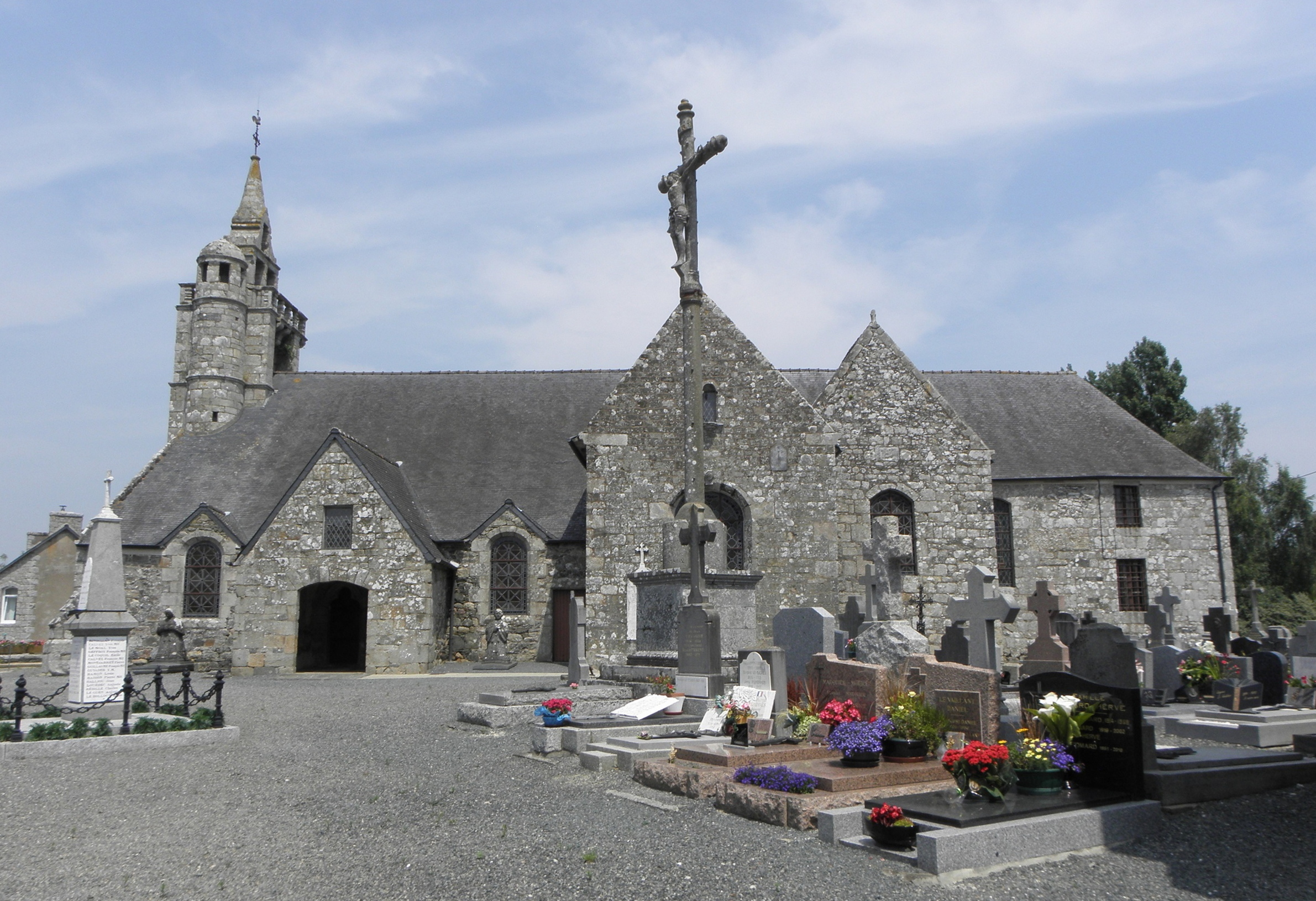 Église Saint-Gilles de Saint-Gilles-les-Bois (22). Vue méridionale.